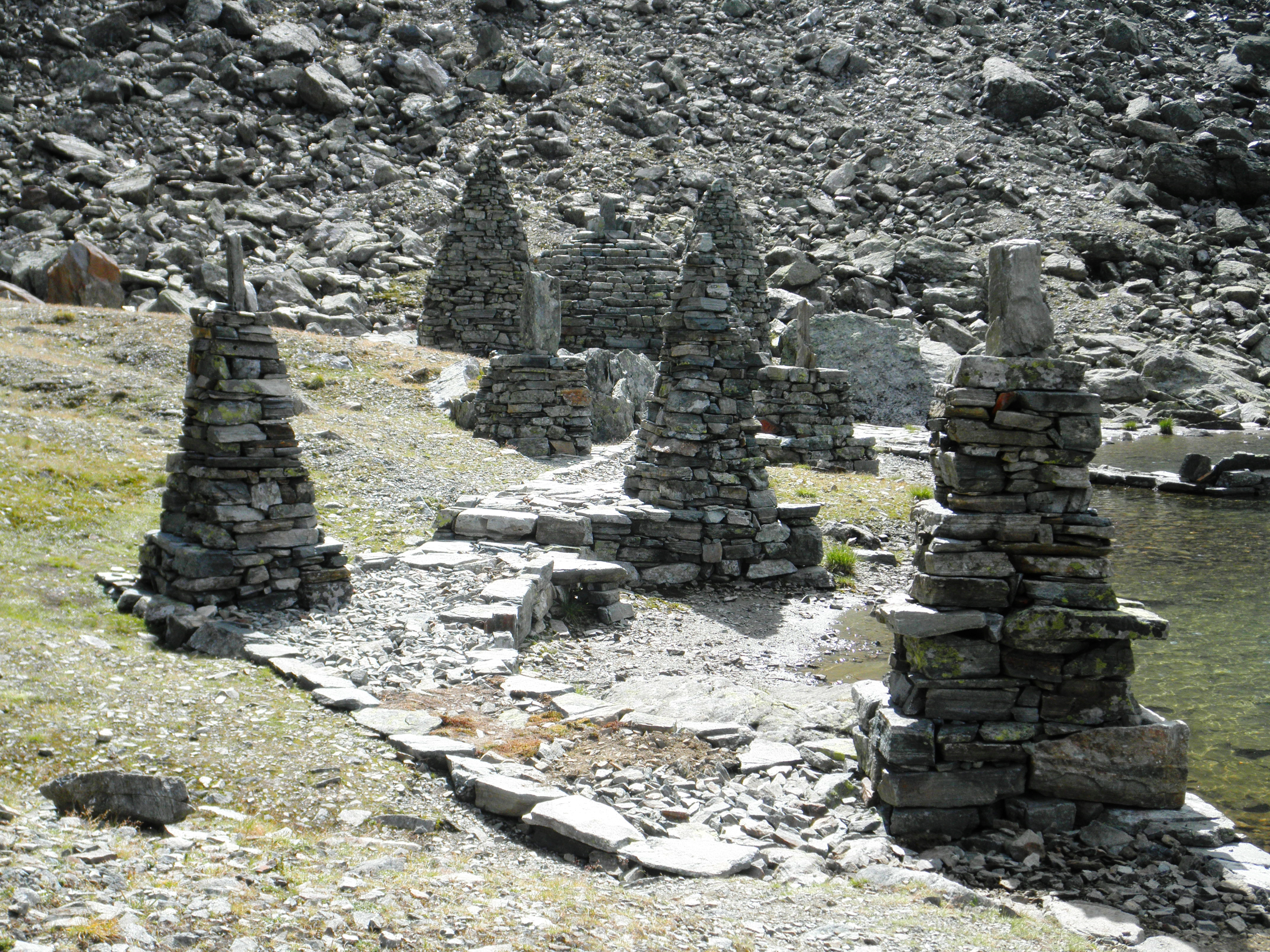 Ein Säulengang führt zu dem Eingangsportal des Apollontempels am Hundstalsee (Österreich).